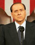 Silvio Berlusconi